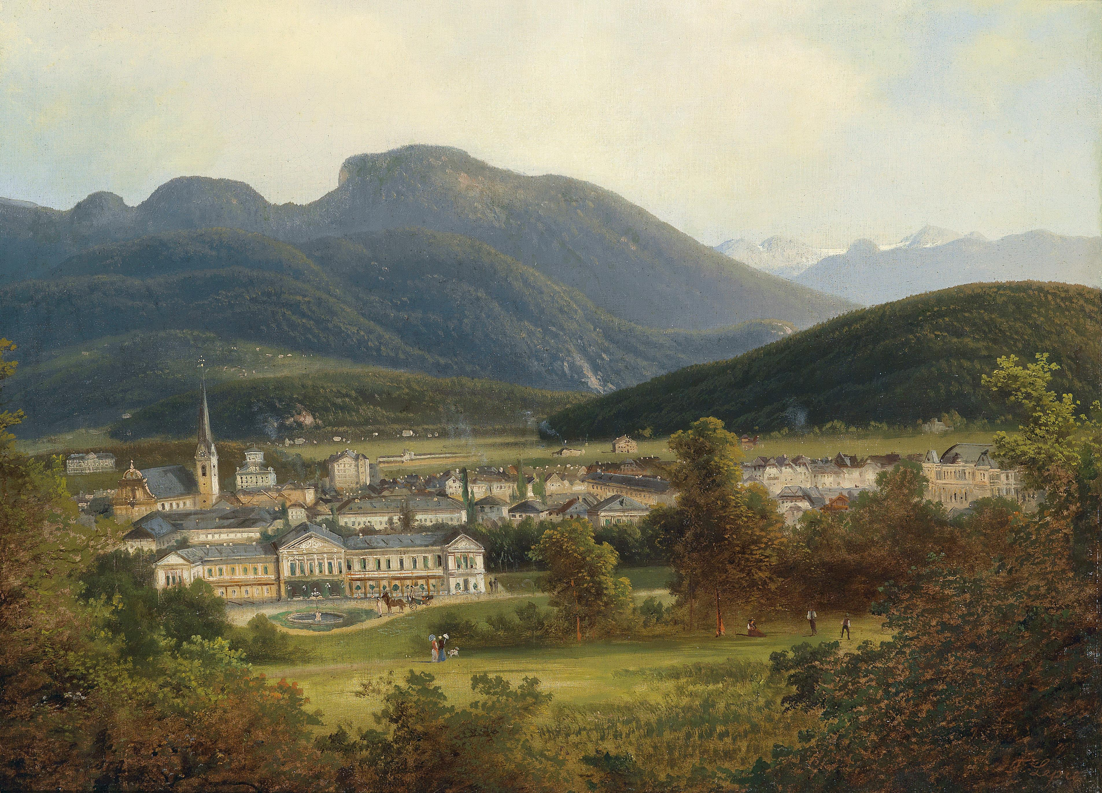 Blick auf Ischl und die Kaiservilla, im Hintergrund der Dachstein, signiert F. Lepie, Öl auf Leinwand, 56,5 x 76 cm